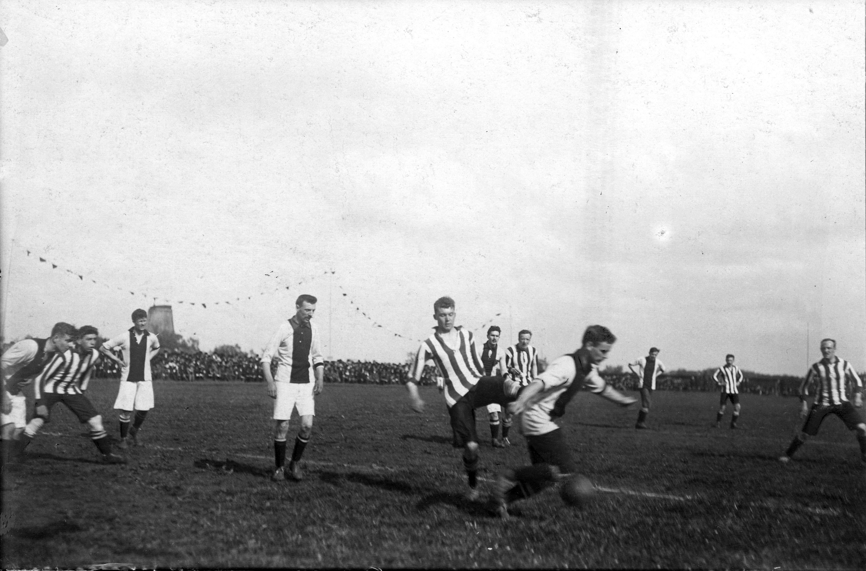 Sport. Voetbal. Kampioenswedstrijd Sparta -Ajax (uitslag 1-1). Frans Schoevaart aan de bal. De Ajax-spelers Adriaan Pelser (links) en Jan Schoevaart (midden) kijken toe. Rotterdam, Nederland, 16 mei 1912.